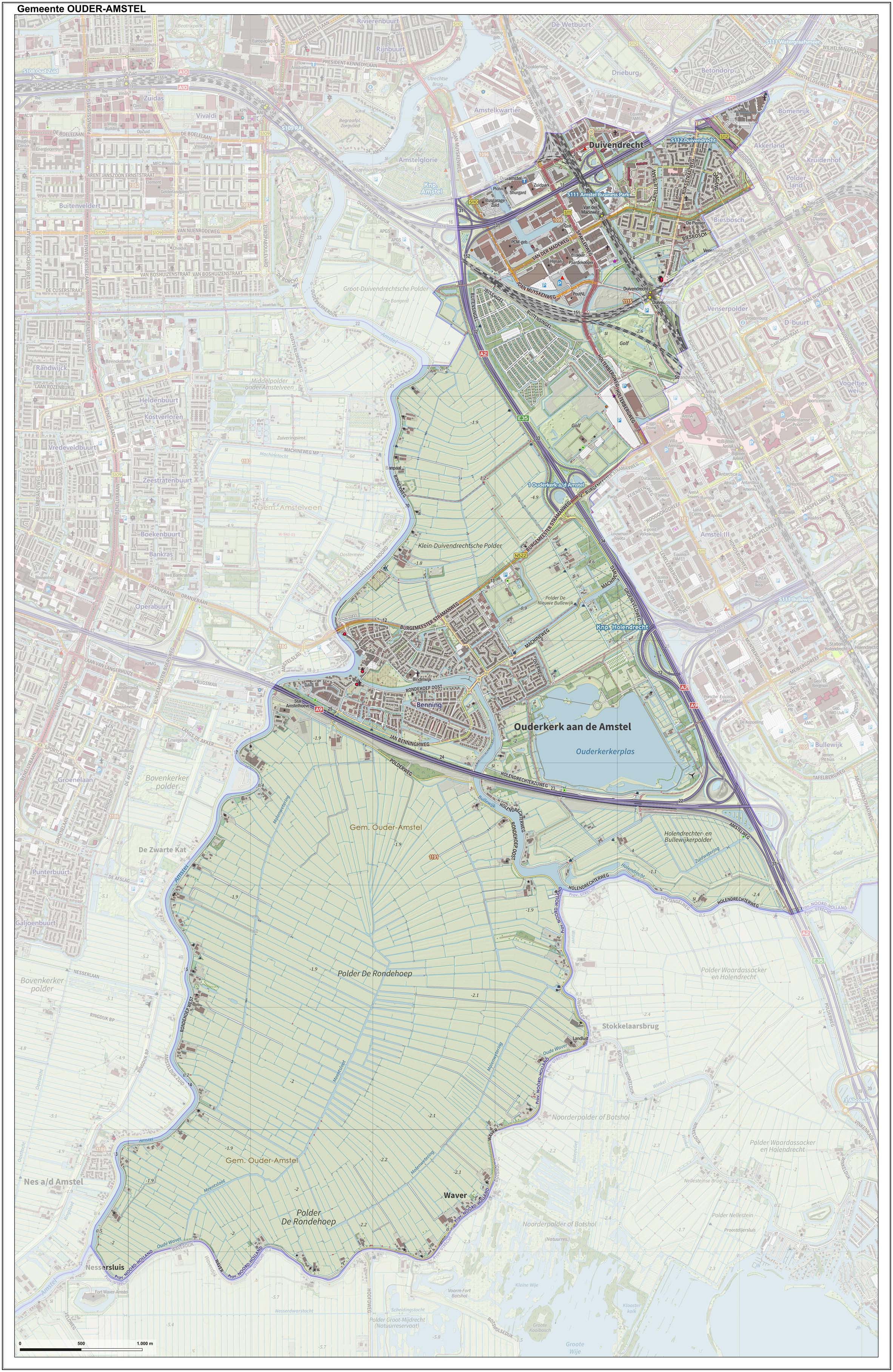 Topografische gemeentekaart. Resolutie: 400 pixels/km. Kaartbeeld samengesteld uit de open geodata van de Top10NL en Top25namen (Kadaster), Creative Commons-BY licentie. Gebouwvlakken uit open geodata BAG extract. Wegen uit de OpenStreetMap, OpenStreetMap community. Reliëfschaduw uit de Actuele Hoogtekaart AHN2. Samenstelling en kleurenschema: Jan-Willem van Aalst, met QGIS. Zie ook de Legenda.